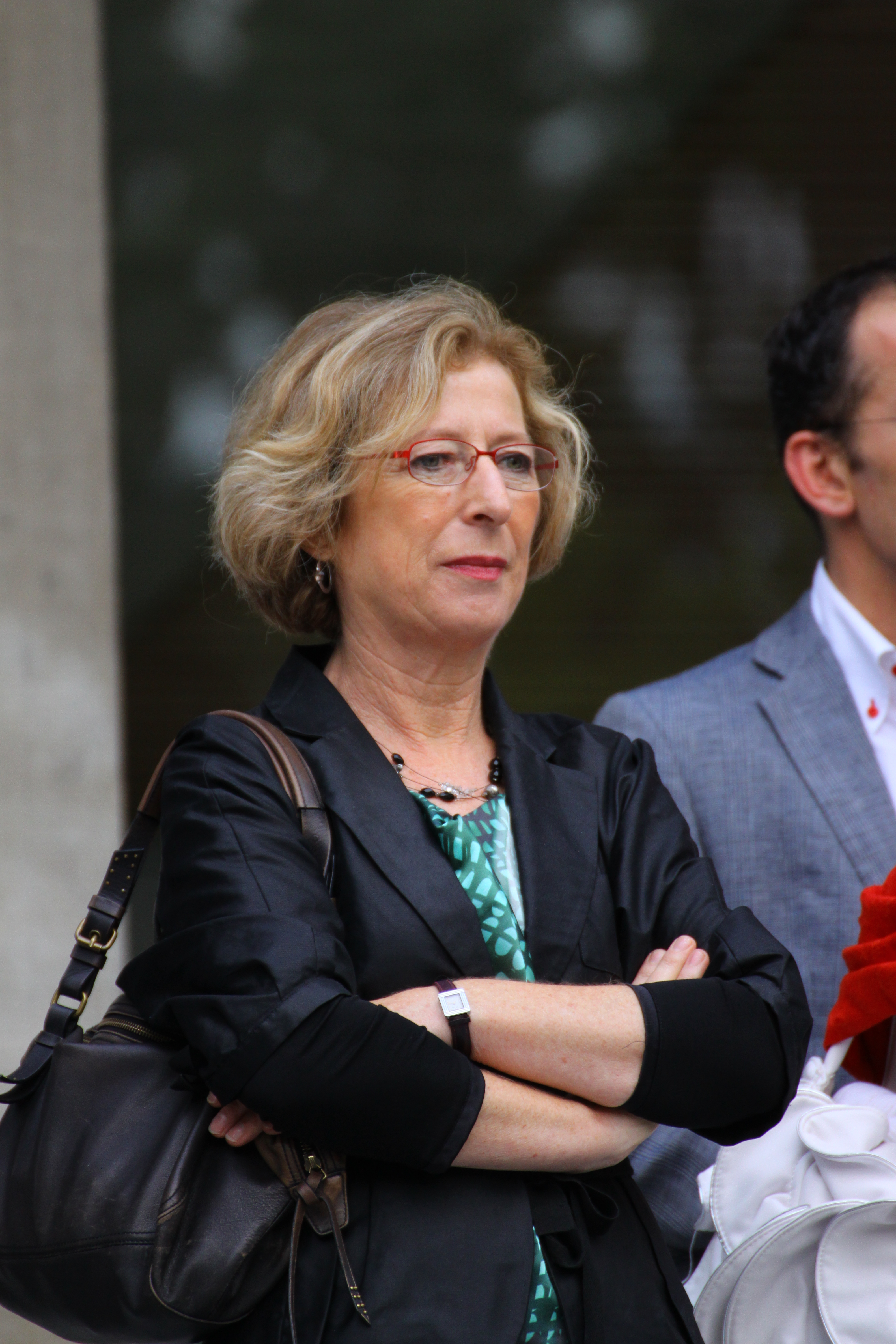 Geneviève Fioraso lors des festivités du 14 juillet 2011 à Grenoble